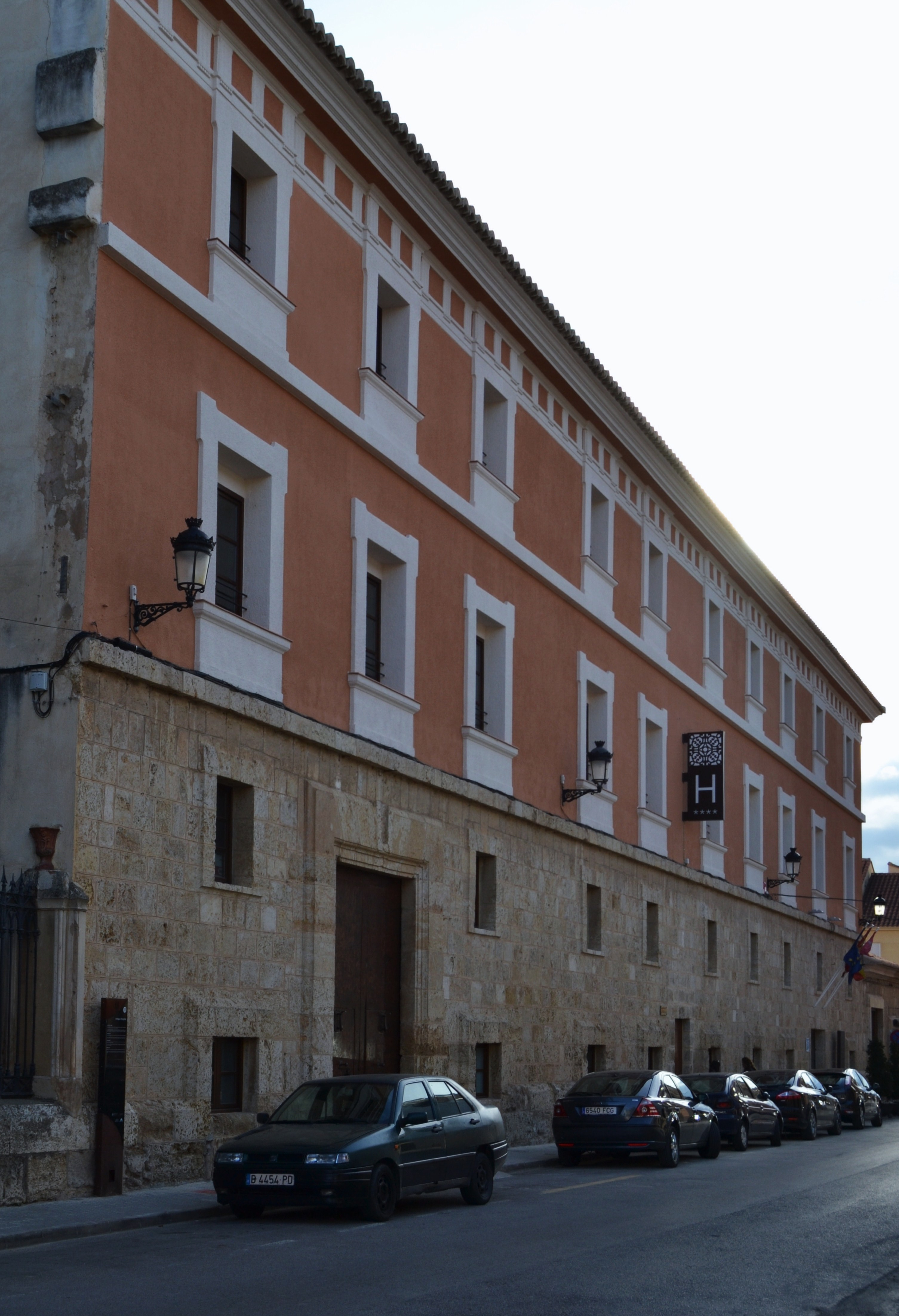 Casa de la Misericòrdia, antic hospital, Sogorb.